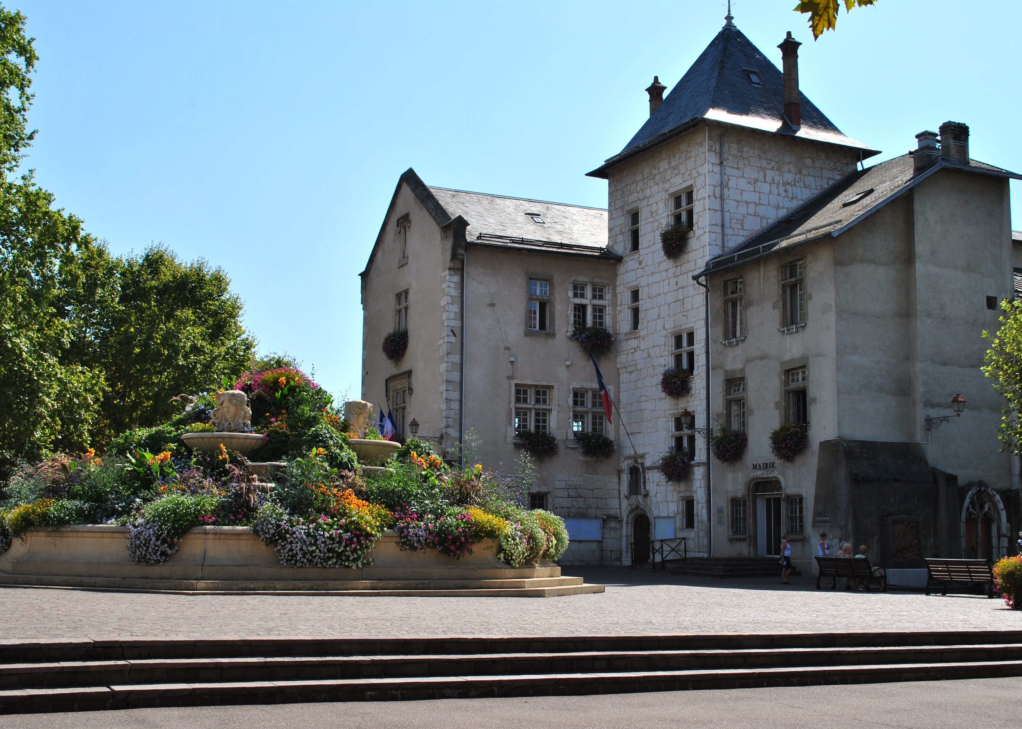 Mairie d'Aix-les-Bains .